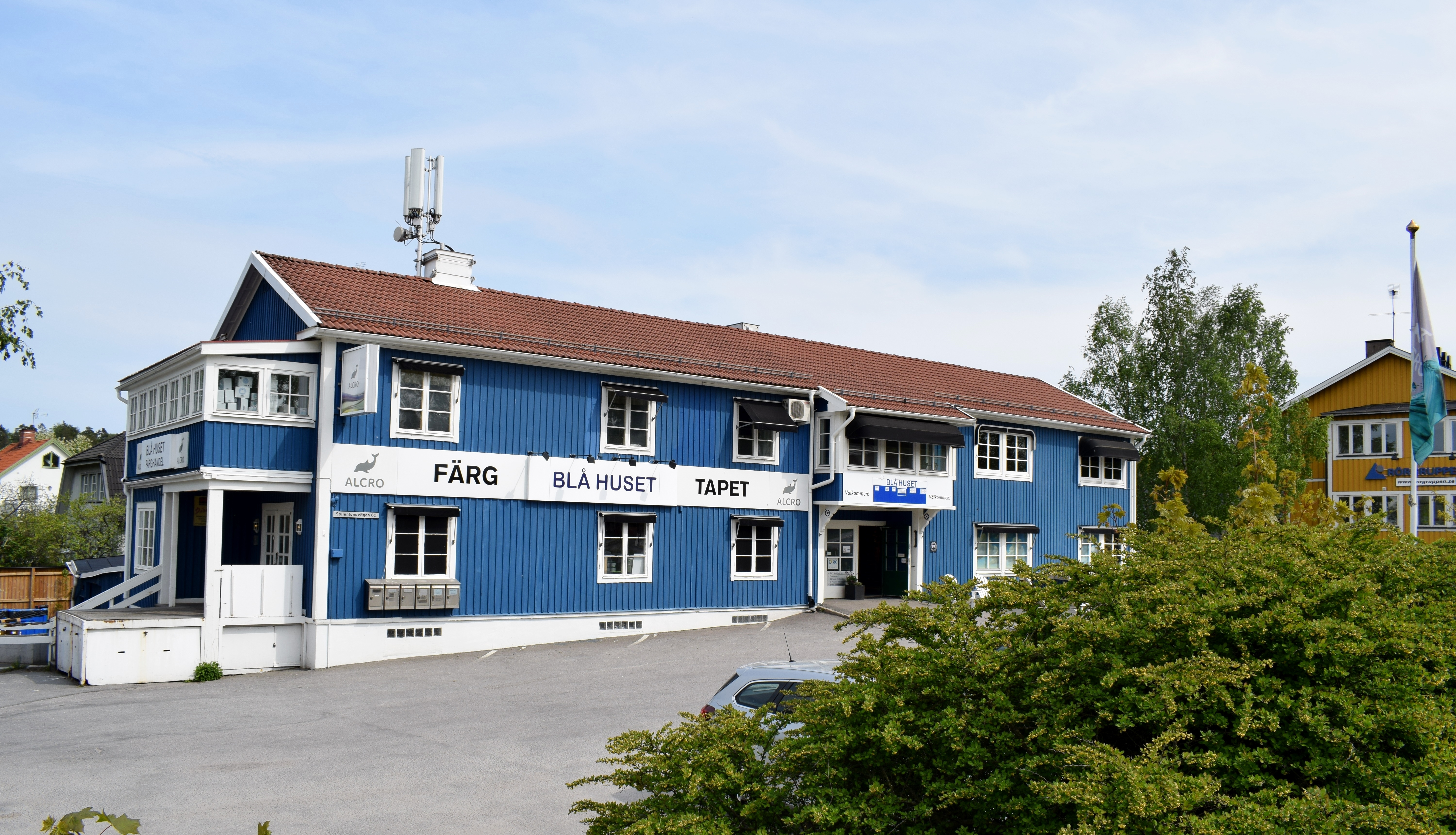 Blå huset är en färgaffär vid Sollentunavägen 80. Byggnaden är bland annat känd från filmen Repmånad från 1979.